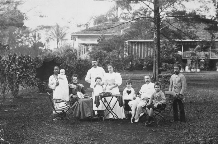 Foto. Groepsportret van de voltallige familie Ponse. Derde van rechts is Jan Theodoor Ponse, die als planter in Deli werkzaam was. Het jongetje rechts was zijn zoon en heette Hans Toetoengan Ponse. De baby op de arm van de baboe links is Kitty Ponse, "Poppie", die later hoogleraar endrocinologie zou worden in Genève. Het iets oudere meisje, vijfde van links, is Nonnie, zij zou later in New York een conservatorium oprichten. Men kan zeggen dat met het verdwijnen van de nyai, de inheemse 'huishoudster' van de blanke planter van 'het Cultuurgebied' en met de komst van steeds meer Europese echtgenotes, de Europeanen in Indië eerder minder dan meer geïntegreerd raakten in de inheemse samenleving. Toch zouden deze families een 'Indisch' karakter houden of krijgen door de aanwezigheid van inheems personeel. Op de foto rechts de djongos of huisbediende en links de baboe oftwel het kindermeisje. Voor Europeanen die in Indië geboren waren was (en is) de baboe een halve heilige die de onschuld maar ook de verlokkingen van de Indische kindertijd vertegenwoordigde. (P. Boomgaard, 2001). Portret van de familie Ponse met visite in de tuin